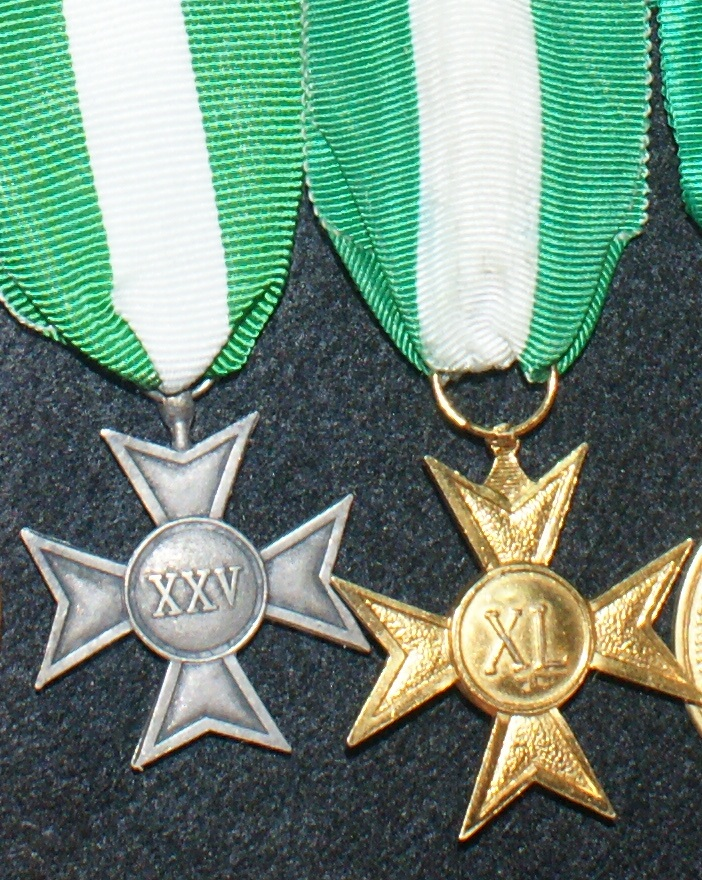 Croci per anzianità di servizio militare. Croce d'argento per truppa (25 anni) e Croce d'Oro per ufficiali e sottufficiali(40 anni). Collezione privata